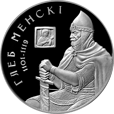 Беларуская (тарашкевіца): Манэта "Глеб Менскі"